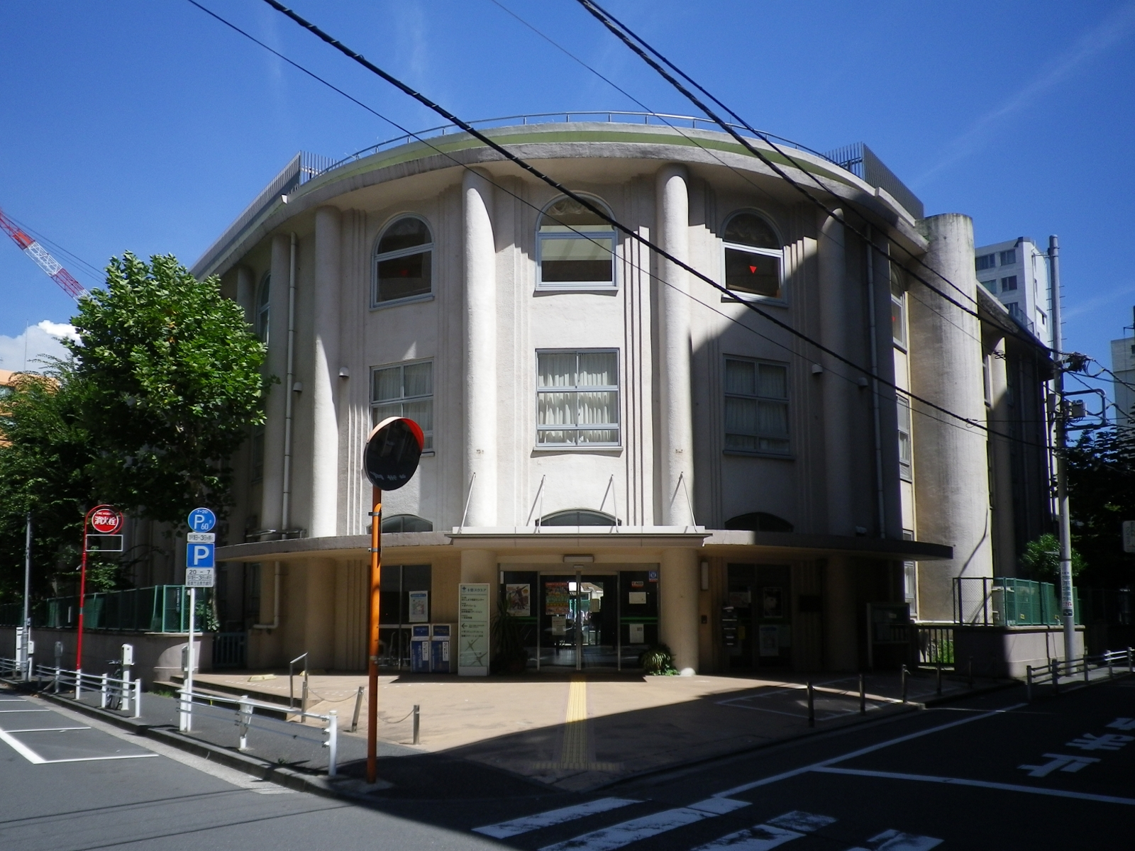 十思スクエア